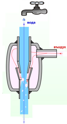 Водна помпа - принцип на действие